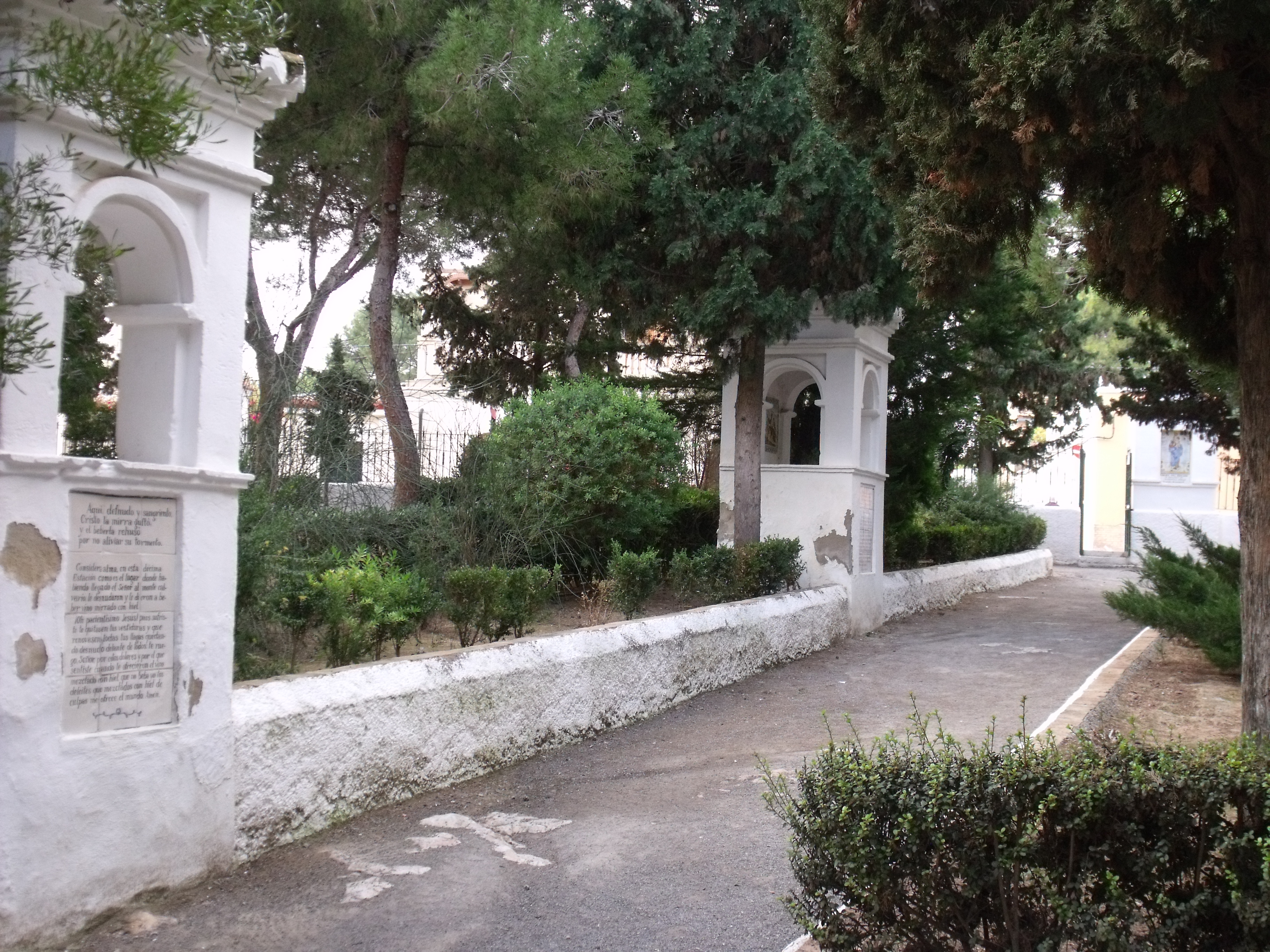 Calvario de Bétera, España.